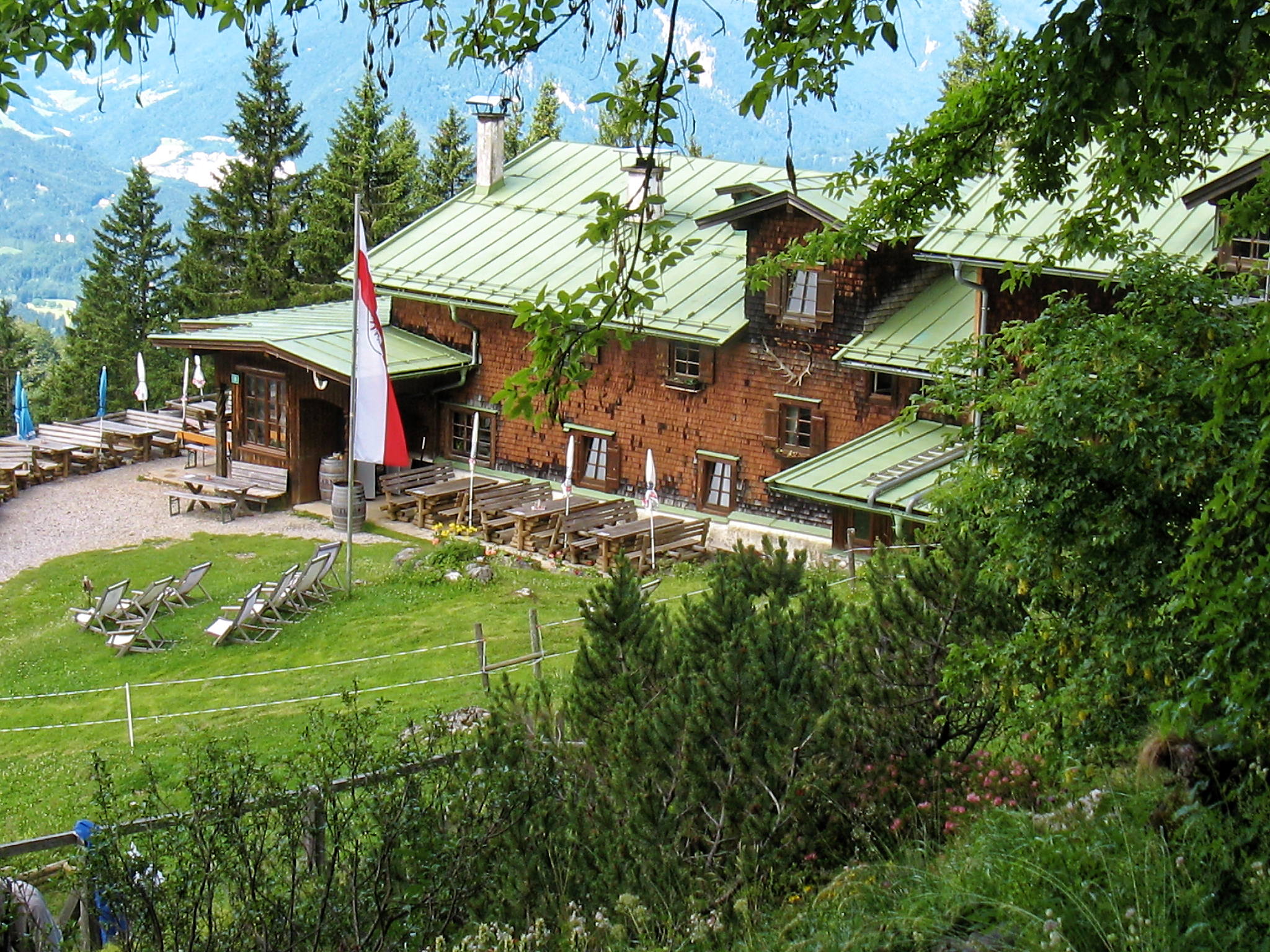 Blick aus dem Alpenpflanzengarten Vorderkaiserfelden auf die Vorderkaiserfeldenhütte